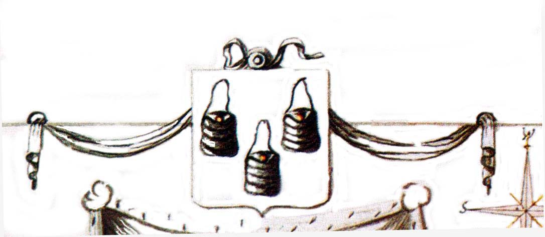 Герб города Сумы (оригинал) с карты города в "Топографическом описании Харьковского наместничества" 1787 года.